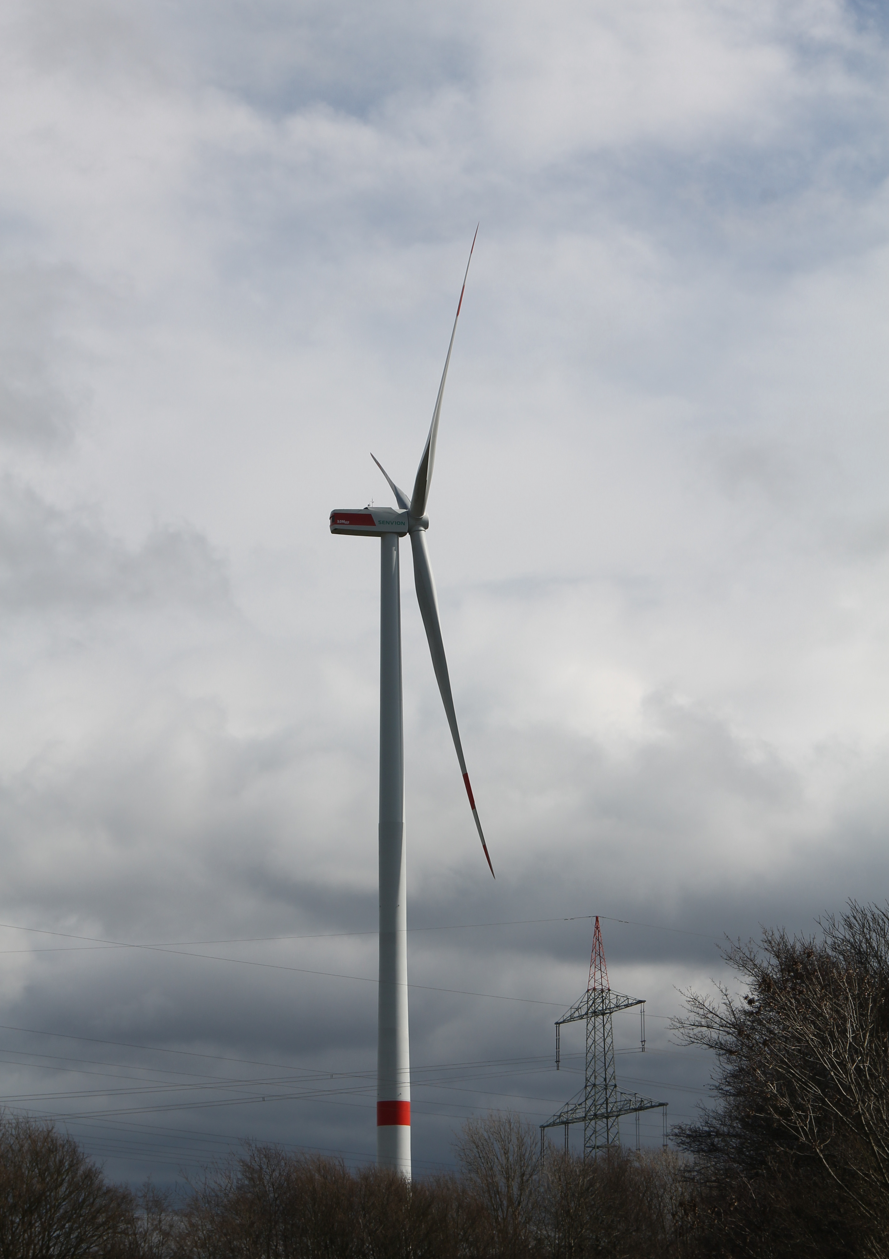 Windenergieanlage Senvion 3.0M122 in Helmern an der A44